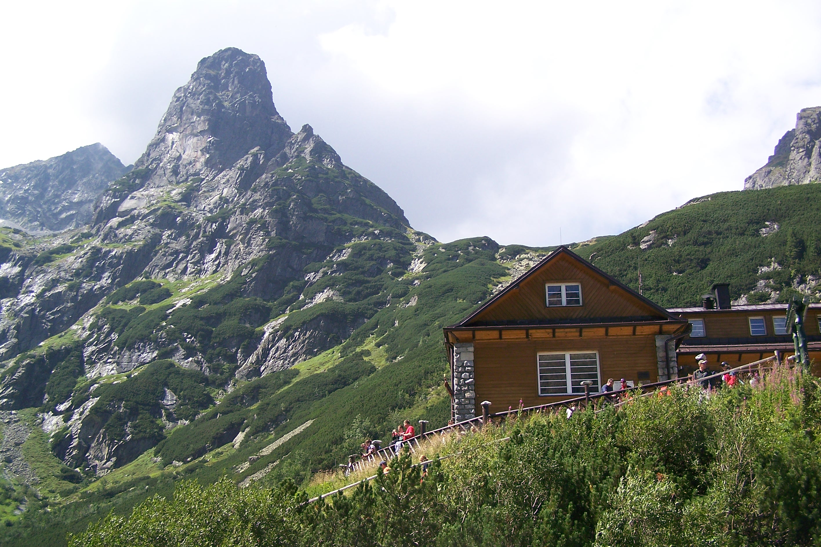 Jastrzębia Turnia nad Zielonym Stawem Kież.